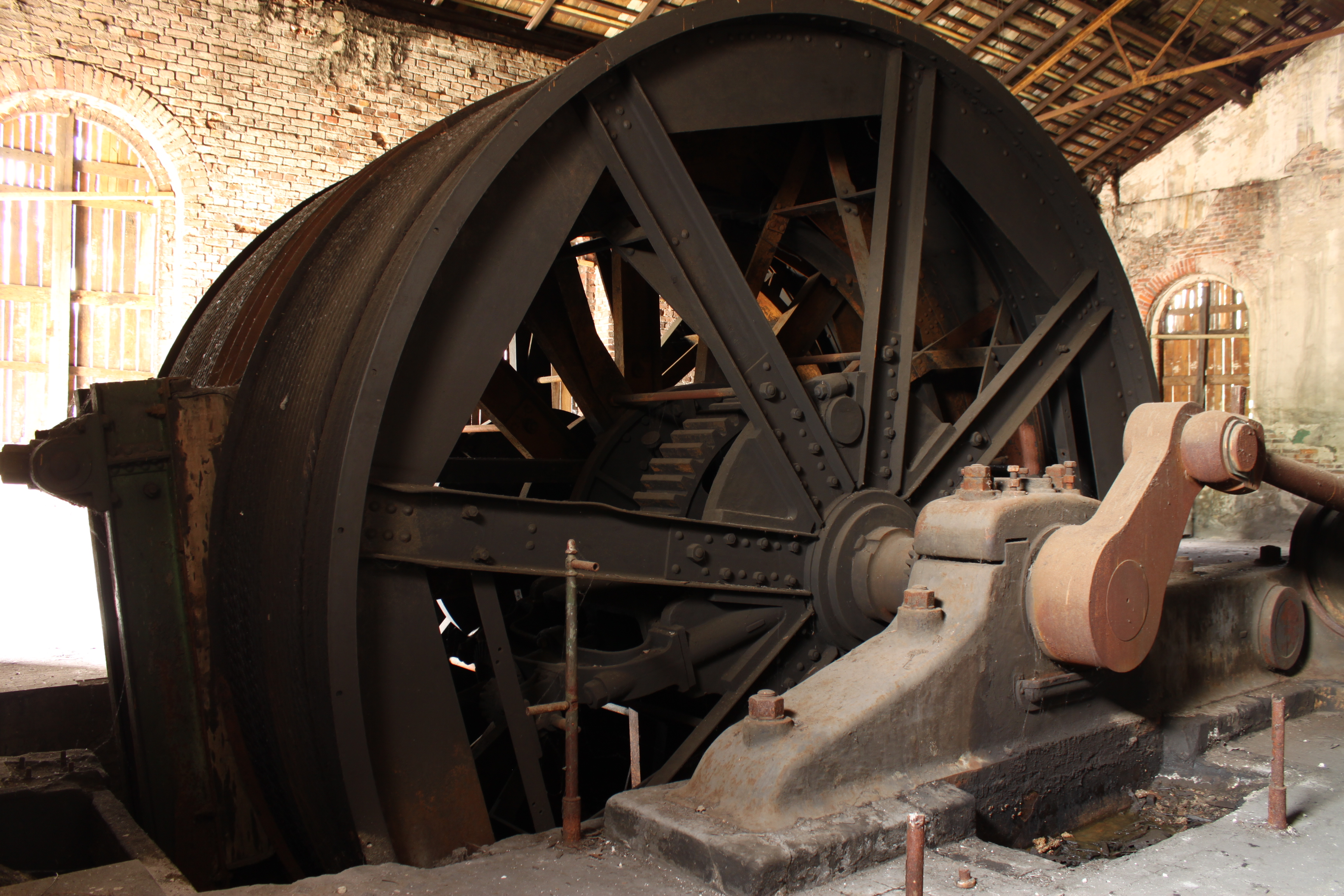 czesc maszyny wyciagowej szybu "Jurand" Ruda Śląską Orzegów, ul. Bytomska 51, Ruda Śląska